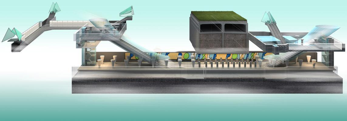 Wielobranżowy Projekt Koncepcyjny centralnego odcinka II lini metra w Warszawie